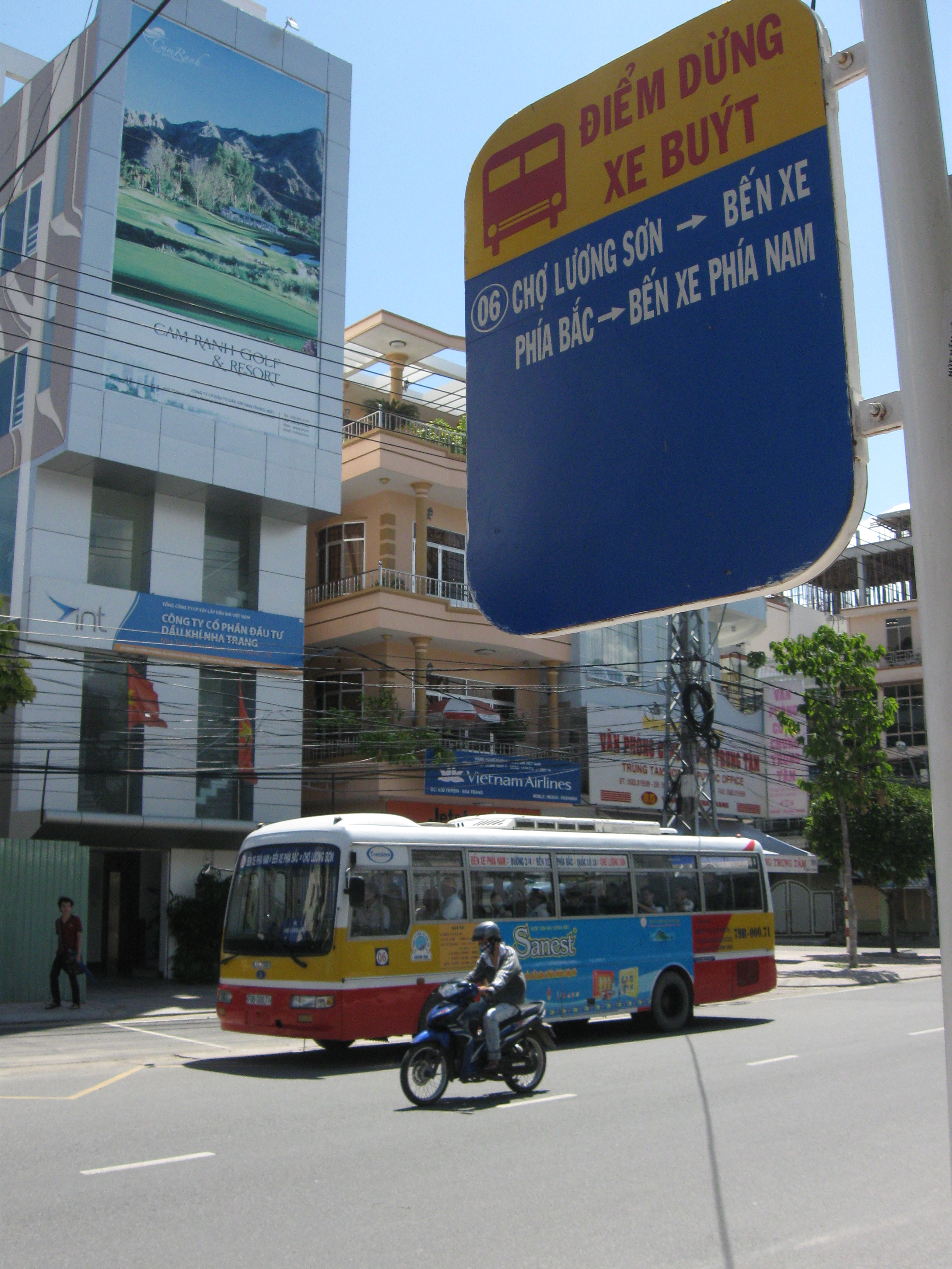 Городской автобус Нячанга (на заднем плане) и знак его остановки (на переднем плане)